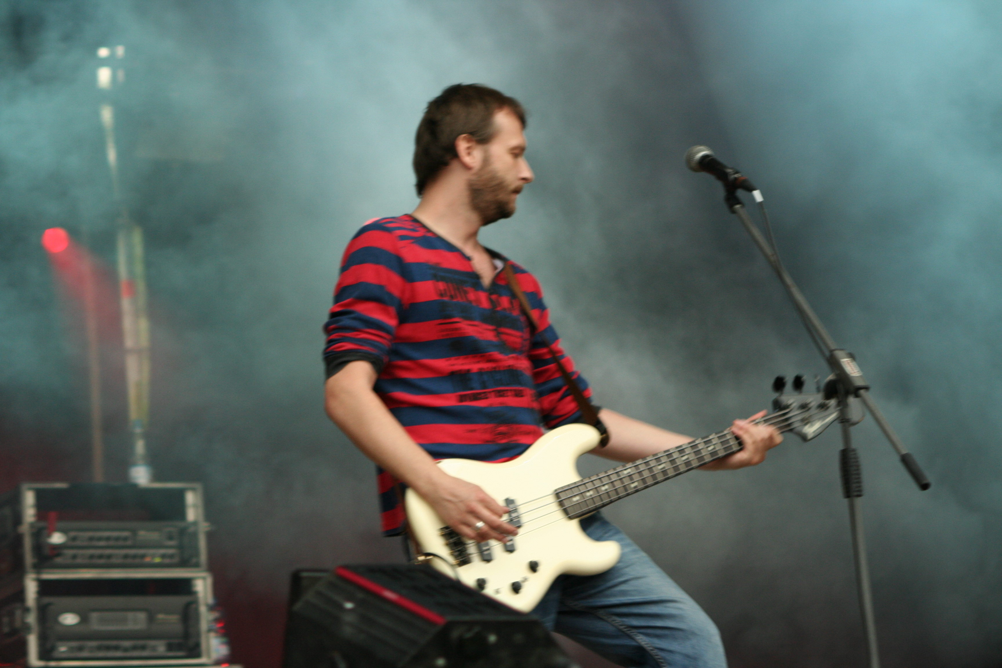 Jacek Chrzanowski, Dezerter, Off Festival 2007, Mysłowice